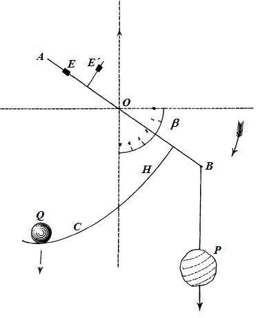 Diagrama del goniobarímetro con directriz normal